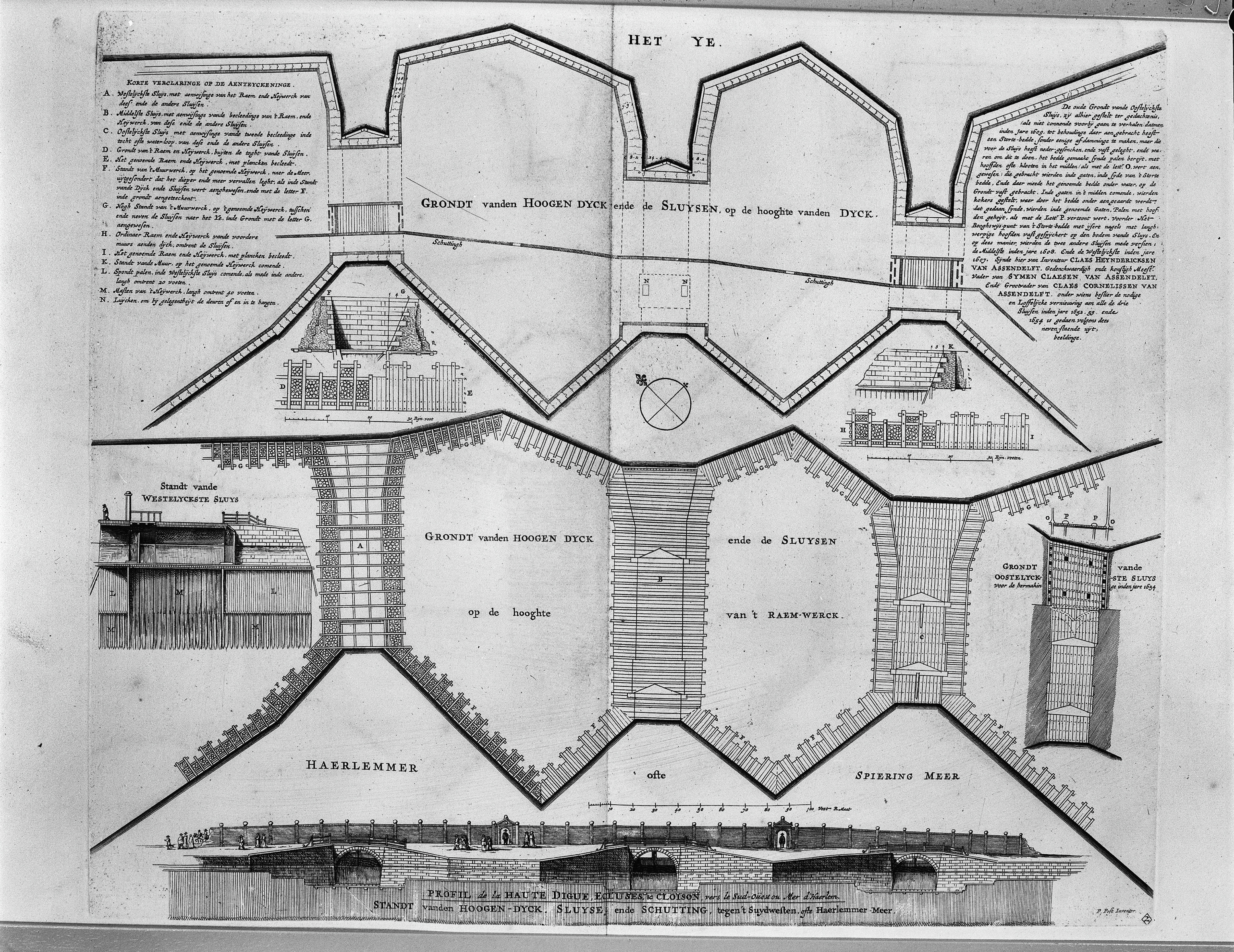 Huis Zwanenburg: Gemeenlandshuis van Rijnlandsluizen